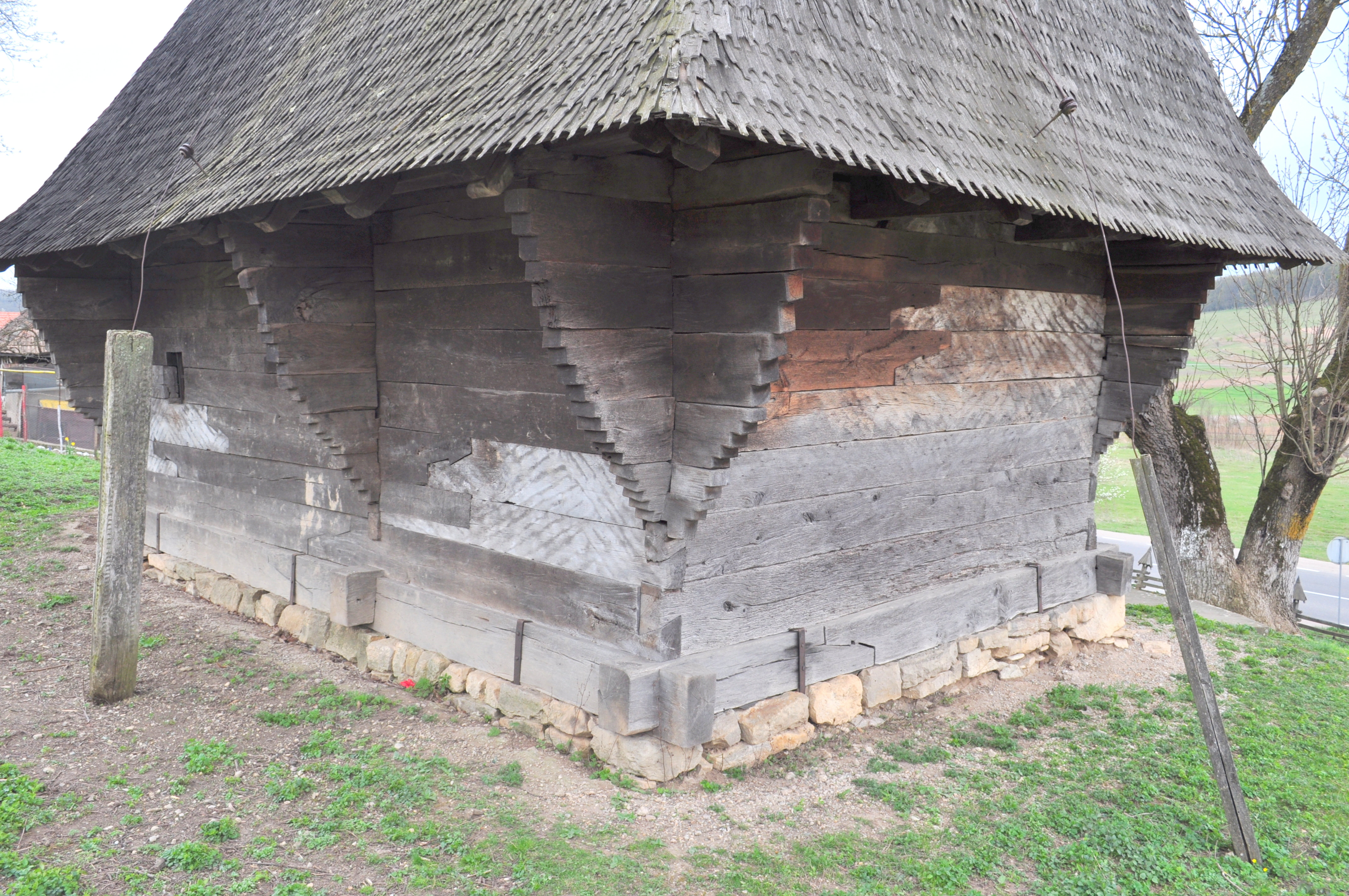 Biserica de lemn „Sfinţii Arhangheli Mihail și Gavriil" din Poarta Sălajului, comuna Românaşi, judeţul Sălaj